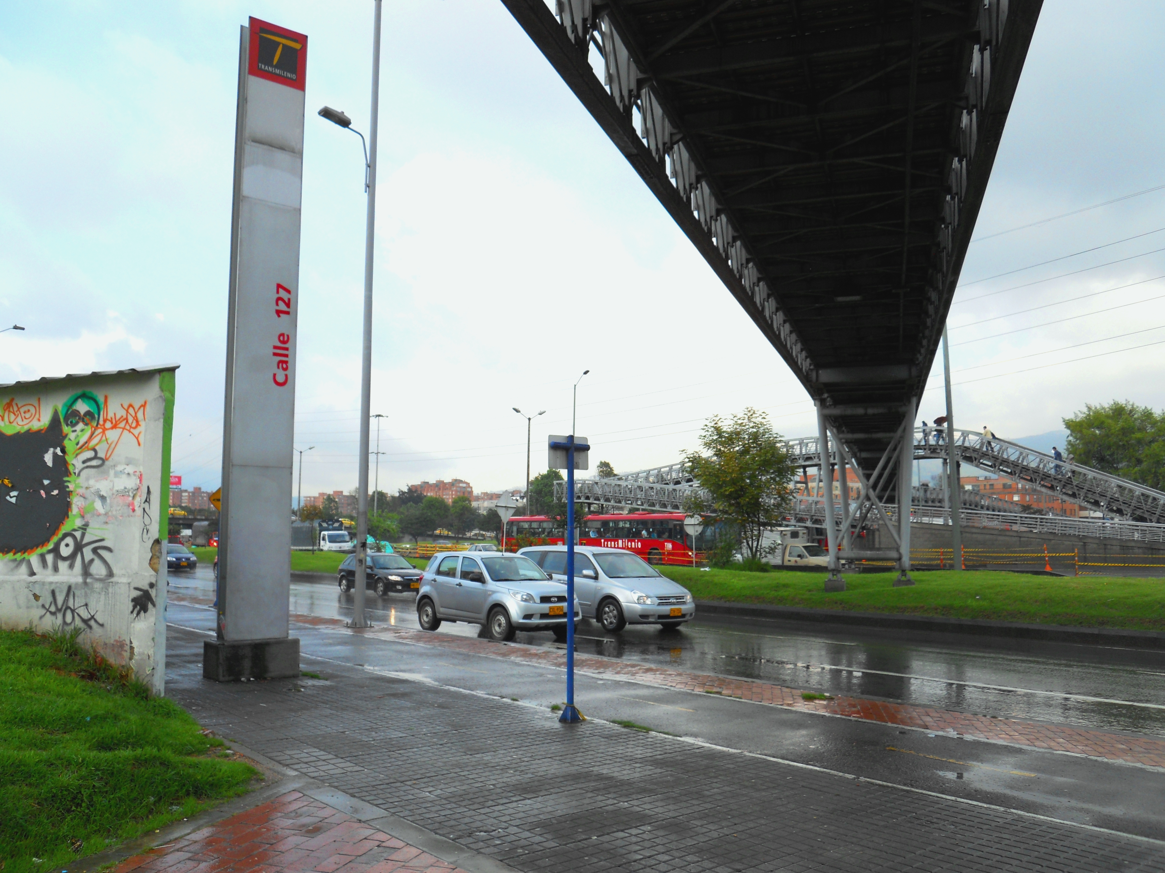 Estación de Transmilenio de la clle 127.